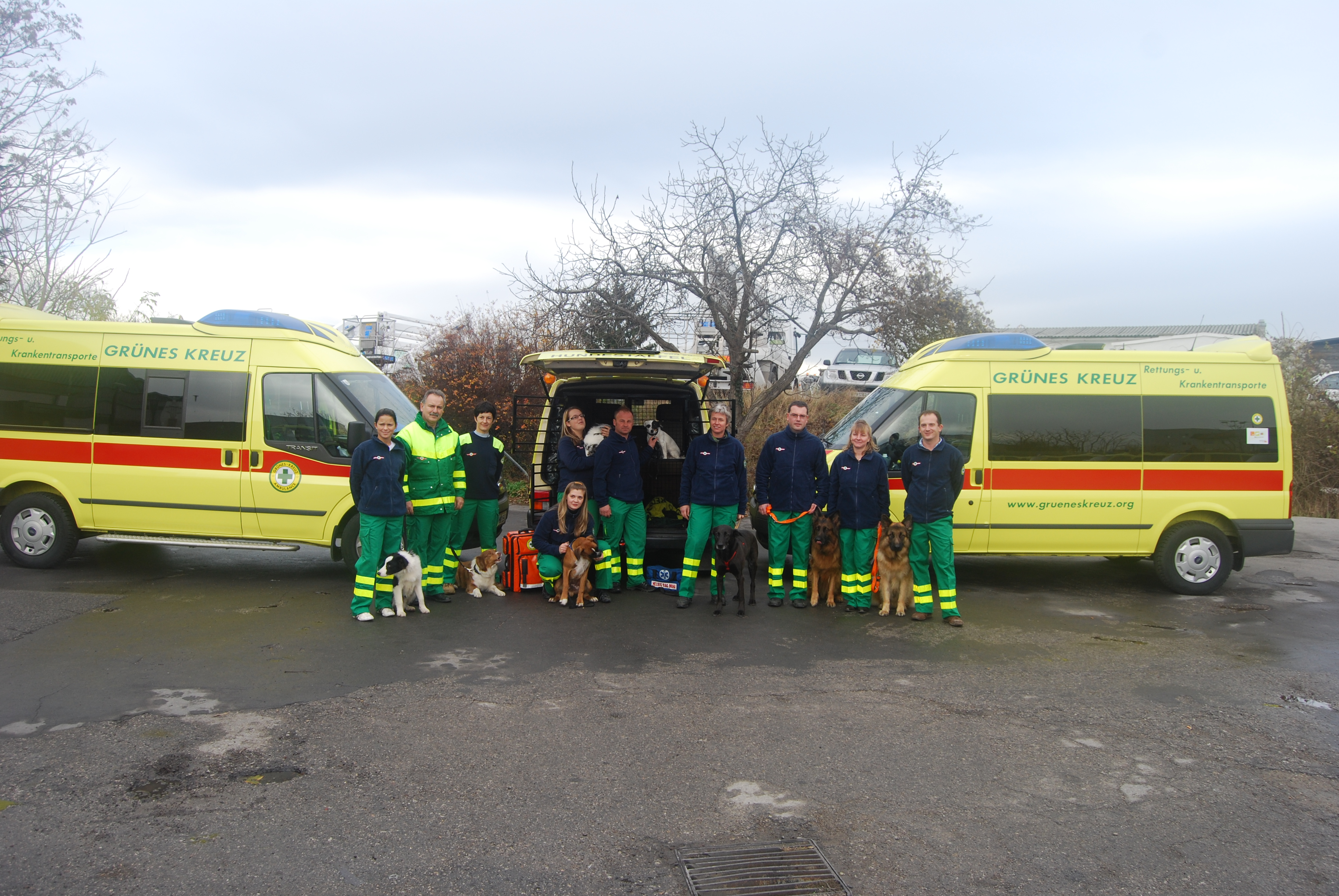 Die Rettungshundestaffel des GRÜNEN KREUZ.